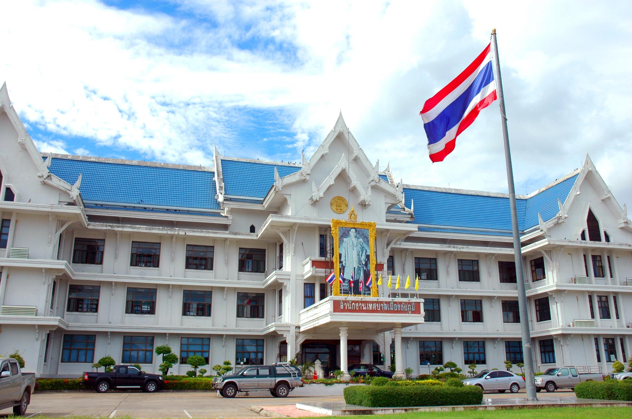 บริเวณด้านหน้าสำนักงานเทศบาลเมืองชัยภูมิ